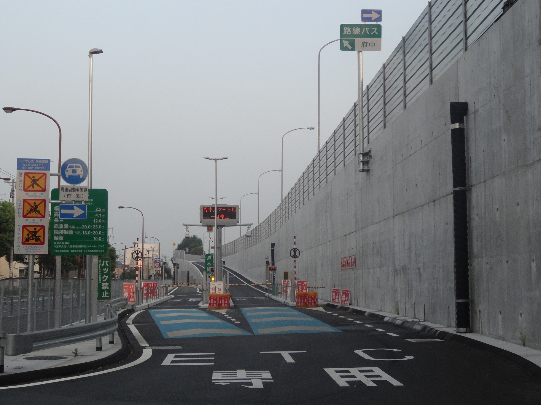 府中スマートインターチェンジ